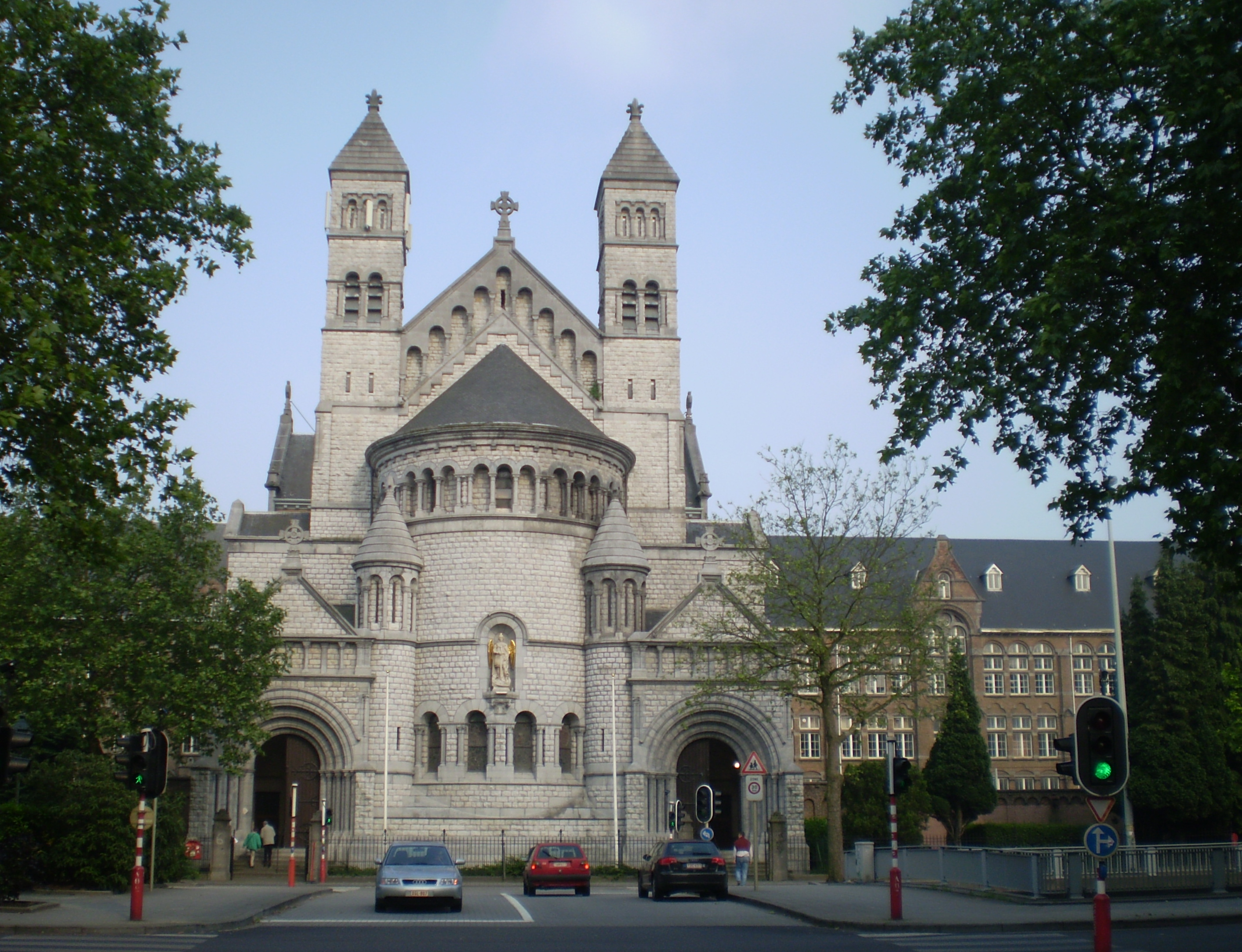 Collège Saint Michel et église Saint Jean Berchmans à Etterbeek, Bruxelles